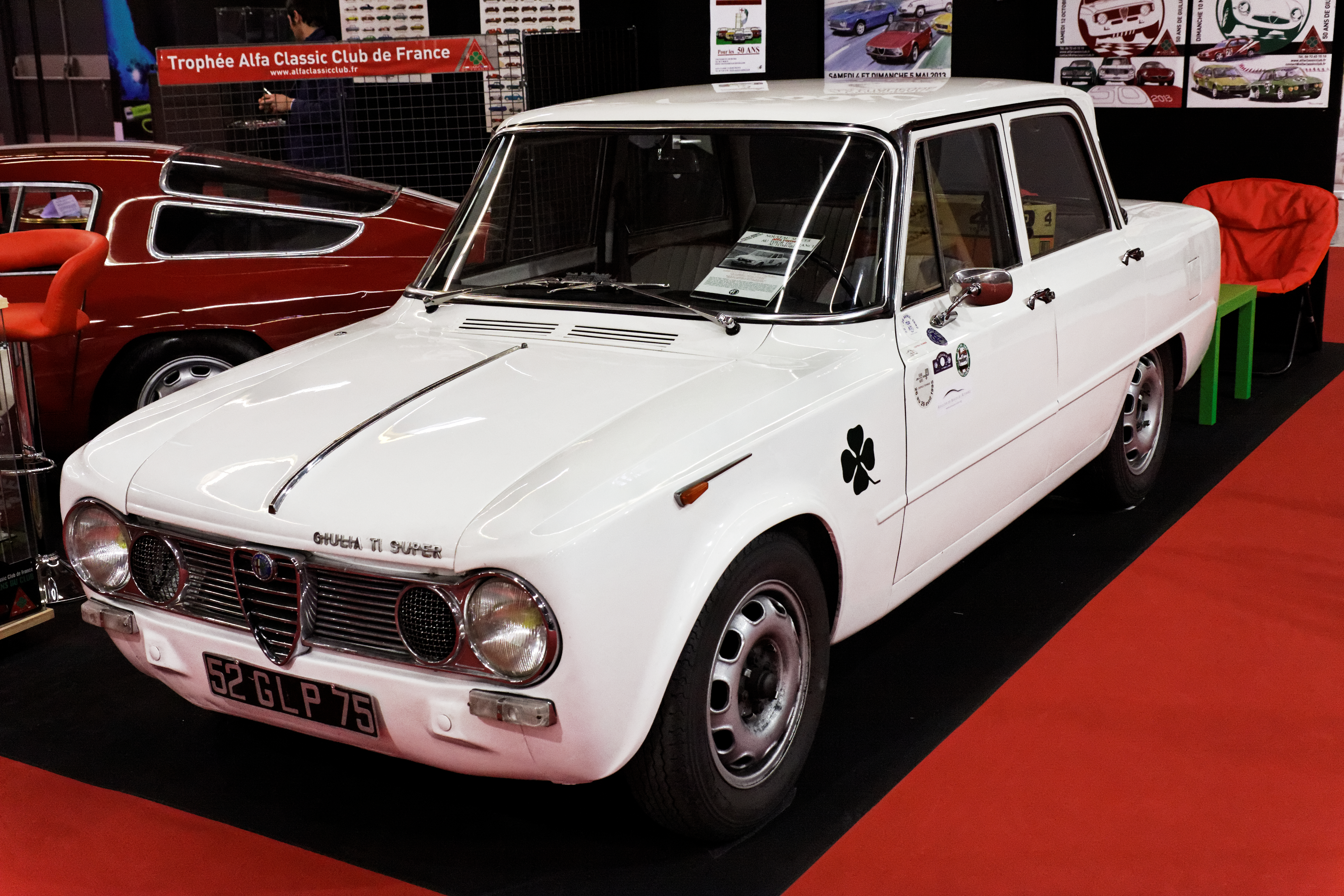 Une Alfa Romeo Giulia TI Super présentée lors du salon Retromobile 2013.